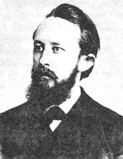 Русский философ-спиритуалист Сергей Аскольдов